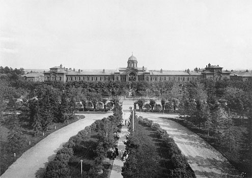 98. Домъ призрЪнiя имени Боевыхъ на СтромынкЪ. (Москва)